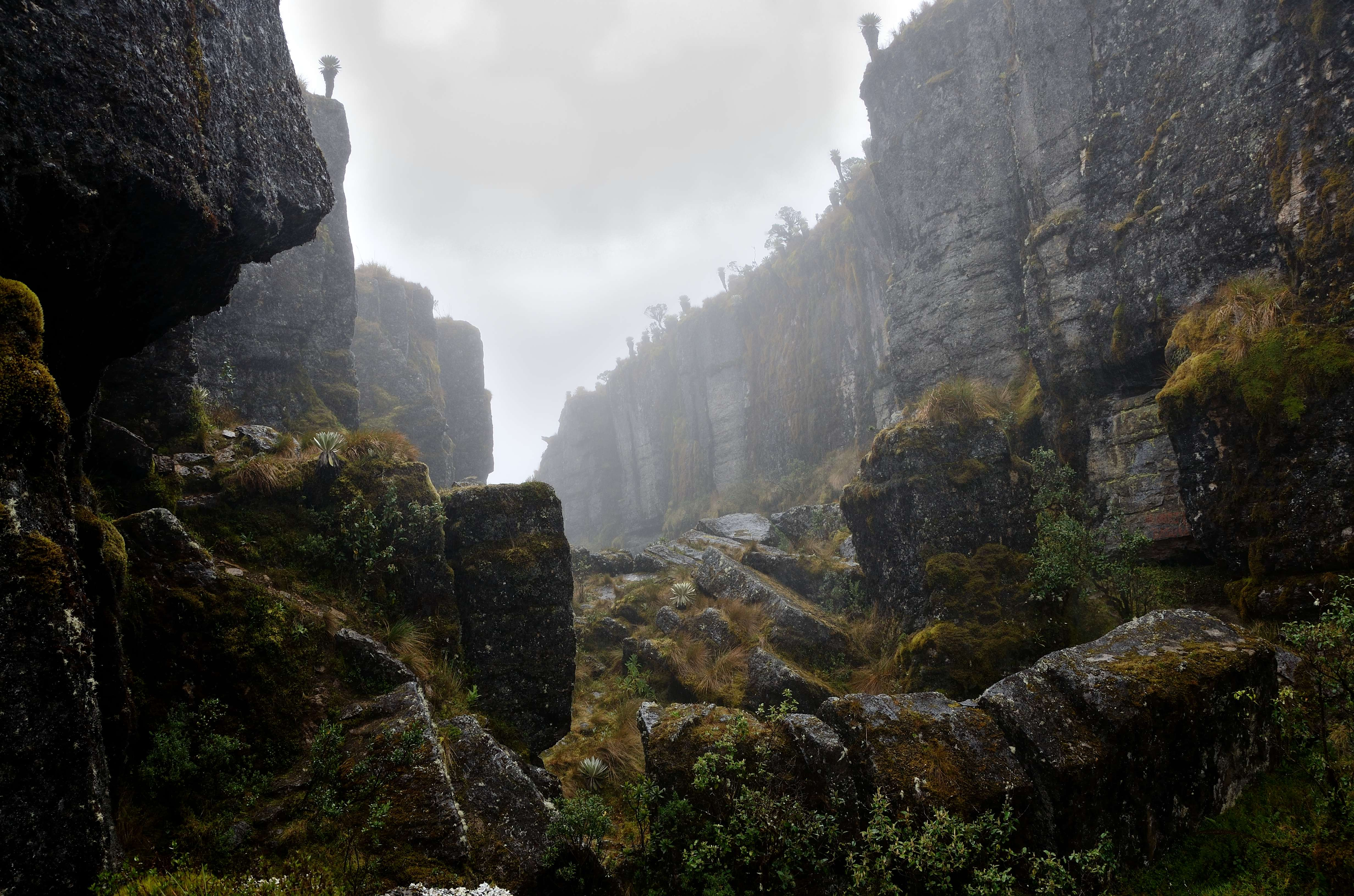 Paramo de Ocetá - Colombia 2012